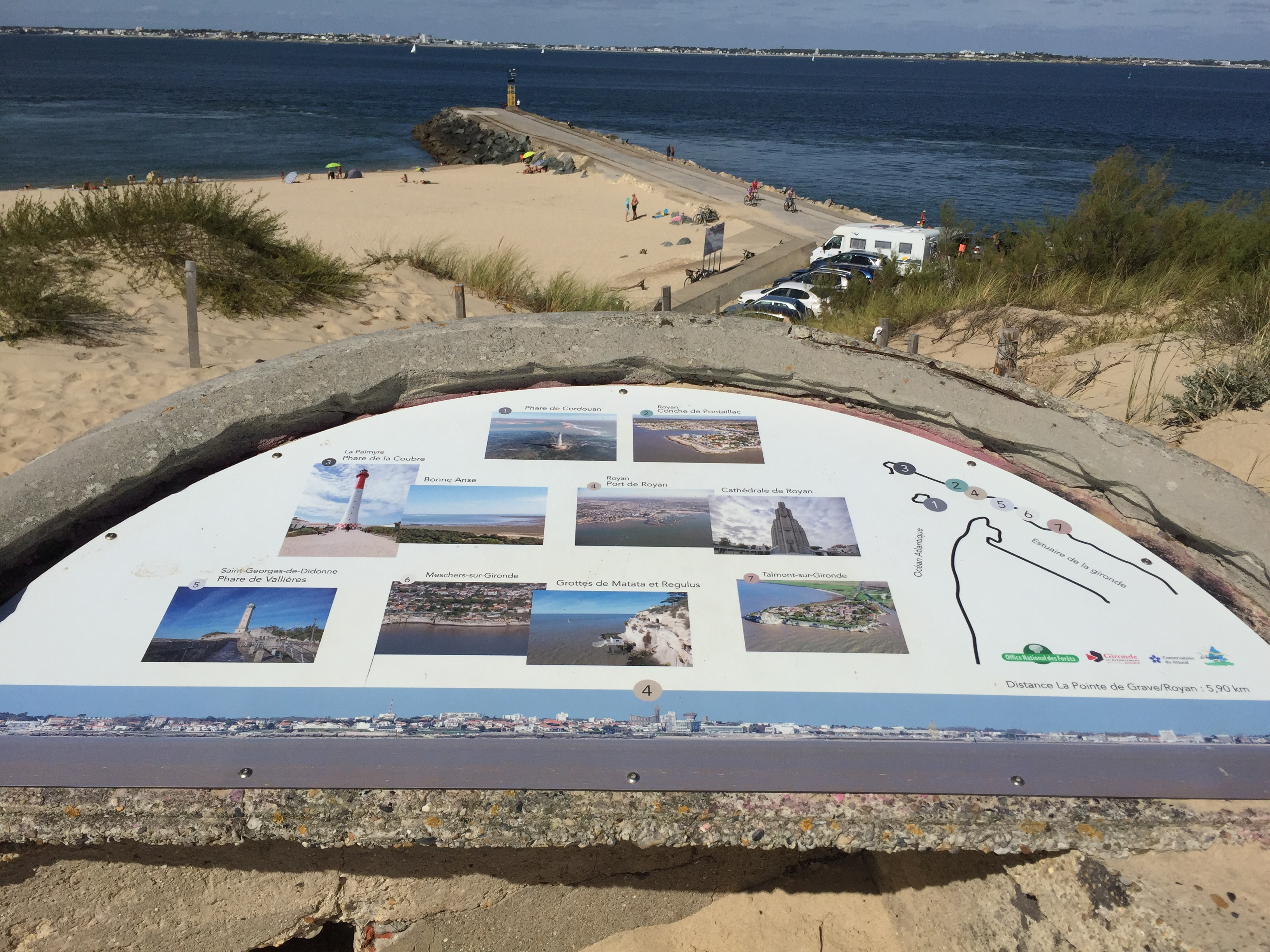 Panorama : on aperçoit au loin la côte charentaise